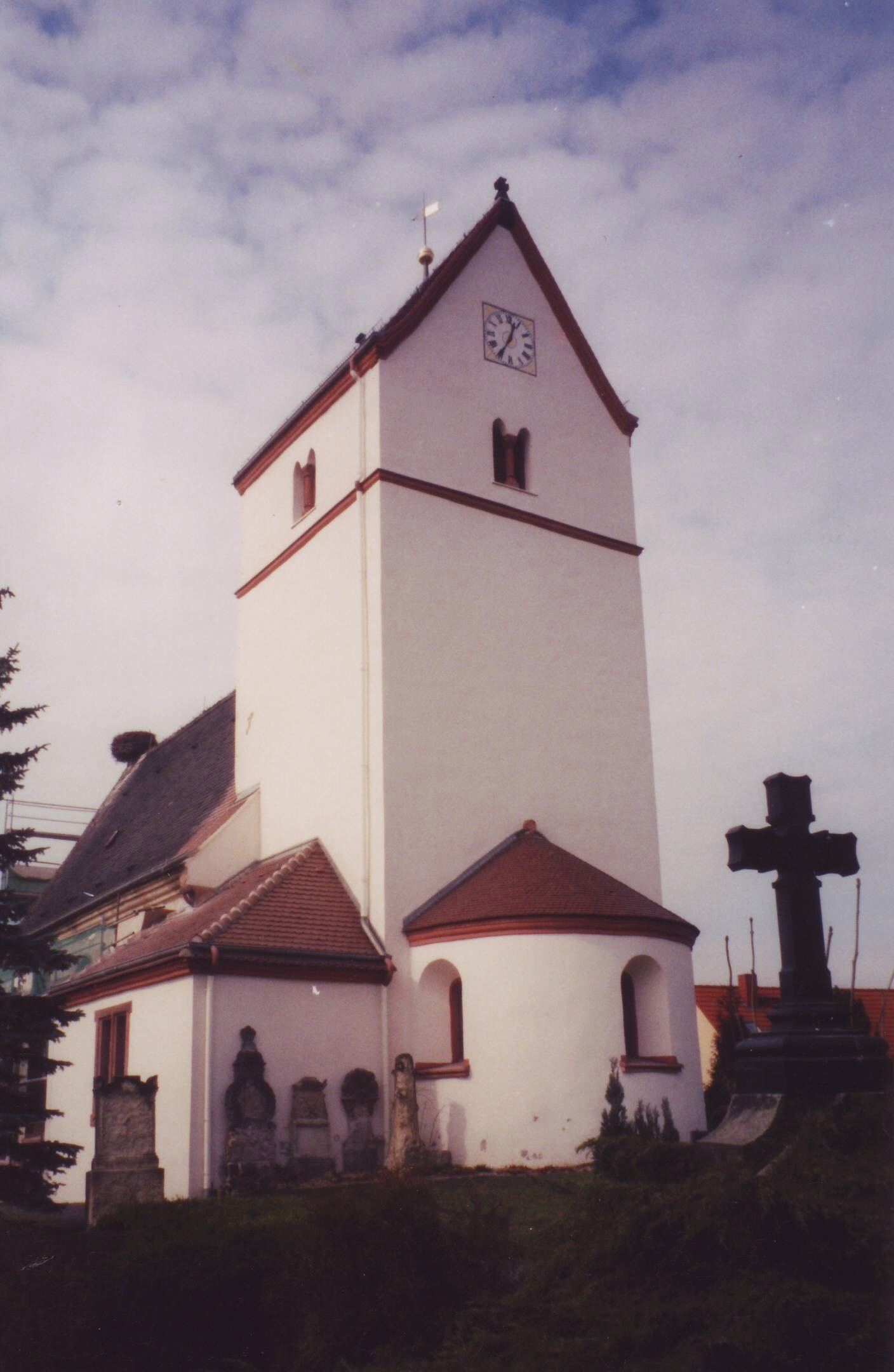 Dorfkirche in Grethen bei Grimma (Aufnahme 1999)